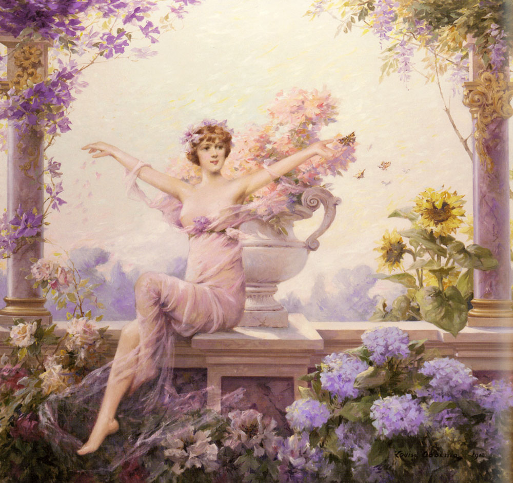 Flora